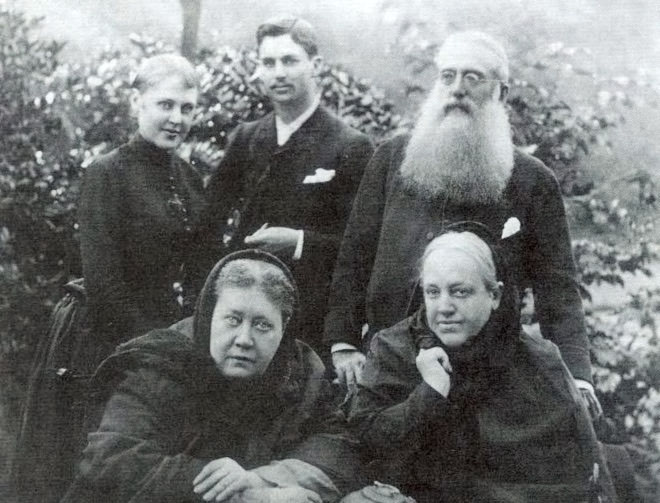 Helena Petrovna Blavatsky (1831-1891, vorne links), Vera Petrovna de Zhelihovsky (1835-1896, Blavatskys Schwester, vorne rechts), Vera Vladimirovna de Zhelihovsky (1864-1923, Blavatskys Nichts, hinten links), Charles Johnston (1867-1931, hinten mitte) und Henry Steel Olcott (1831-1907, hinten rechts) in London im Oktober 1888